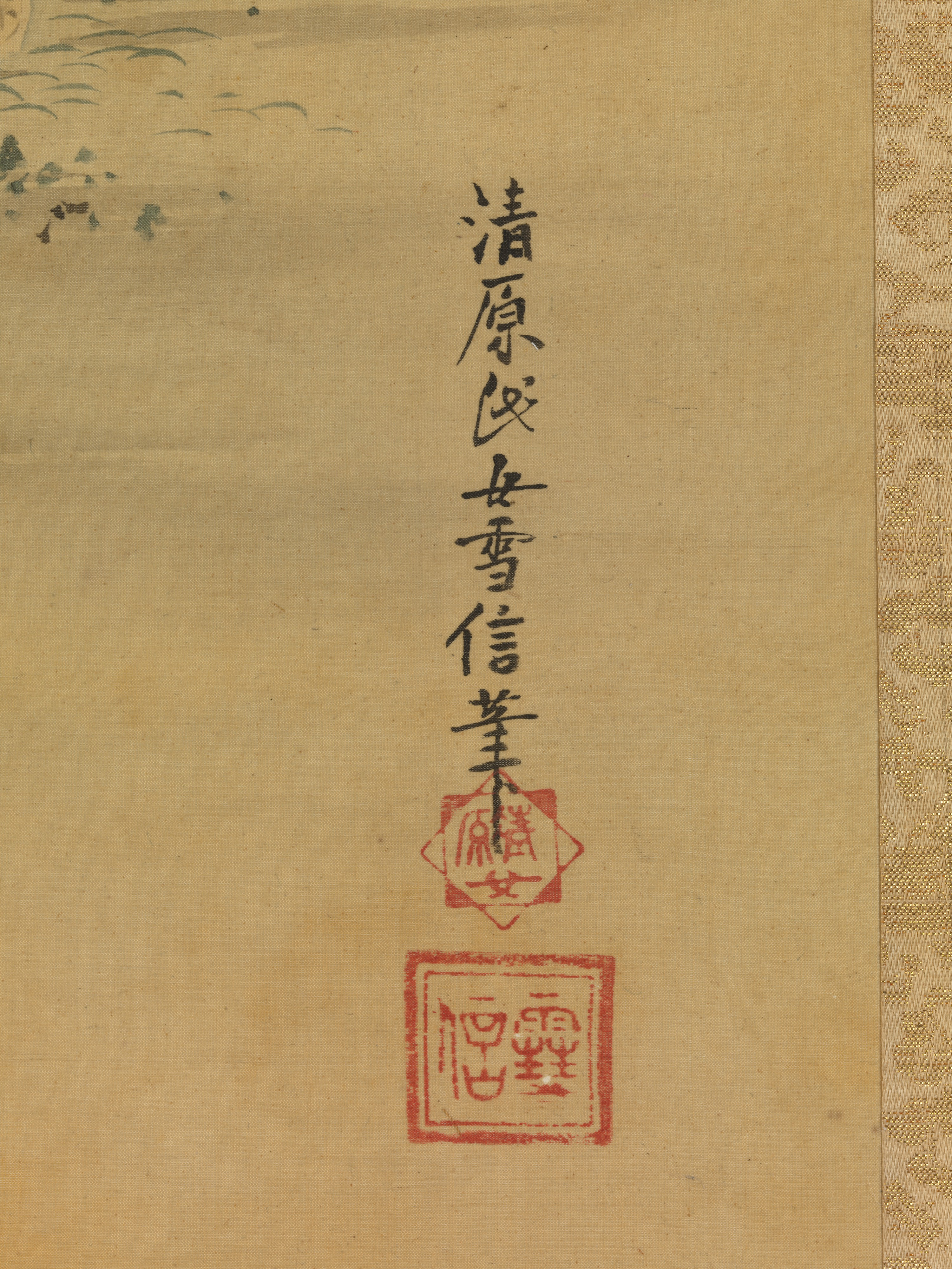 Japan; Hanging scroll; Paintings